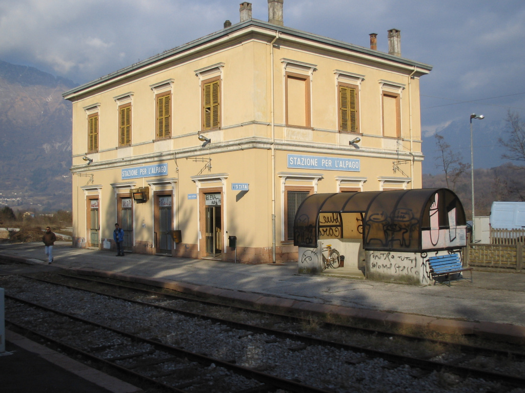 Stazione per L'alpago (linea conegliano-ponte nelle alpi)